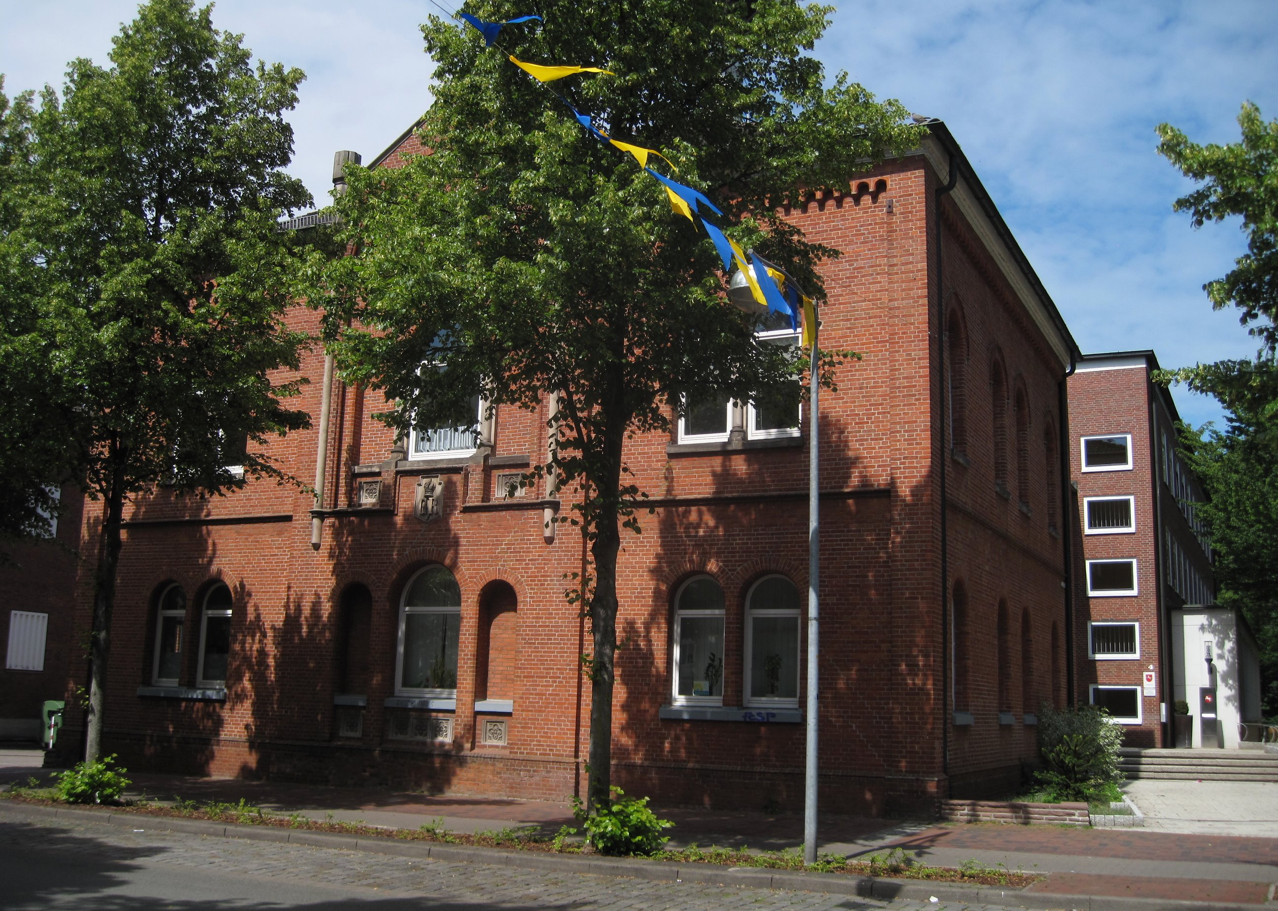 Amtsgericht Buxtehude, Bahnhofstraße 4 in Buxtehude.